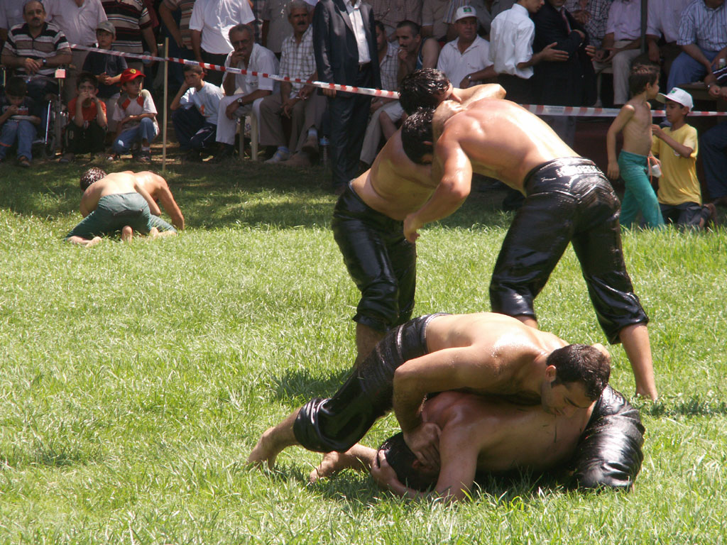 Yağlı güreş tournament in Istanbul on 6th August 2006